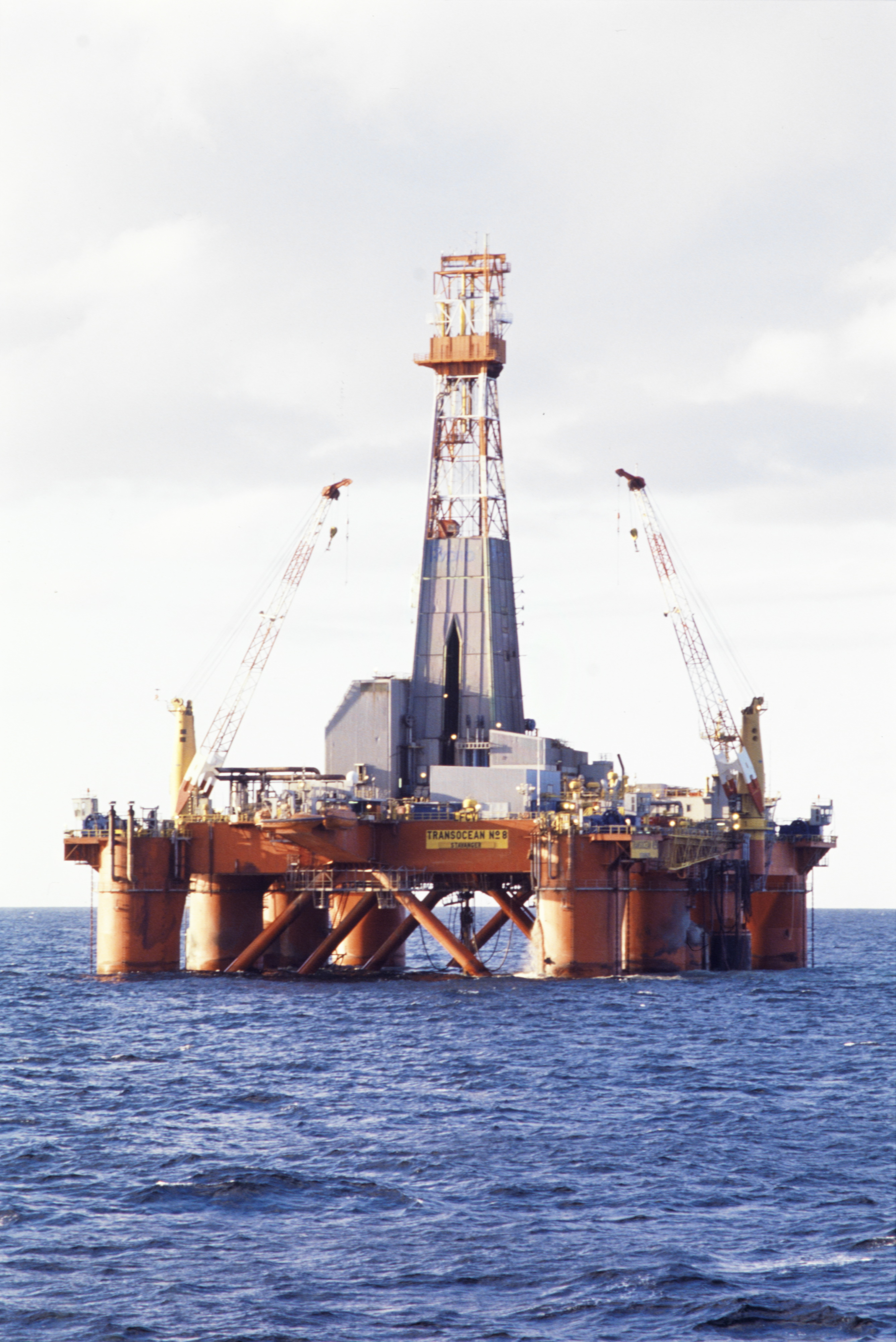 Transocean No 8 flyttbar oljerigg. Nordsjøen